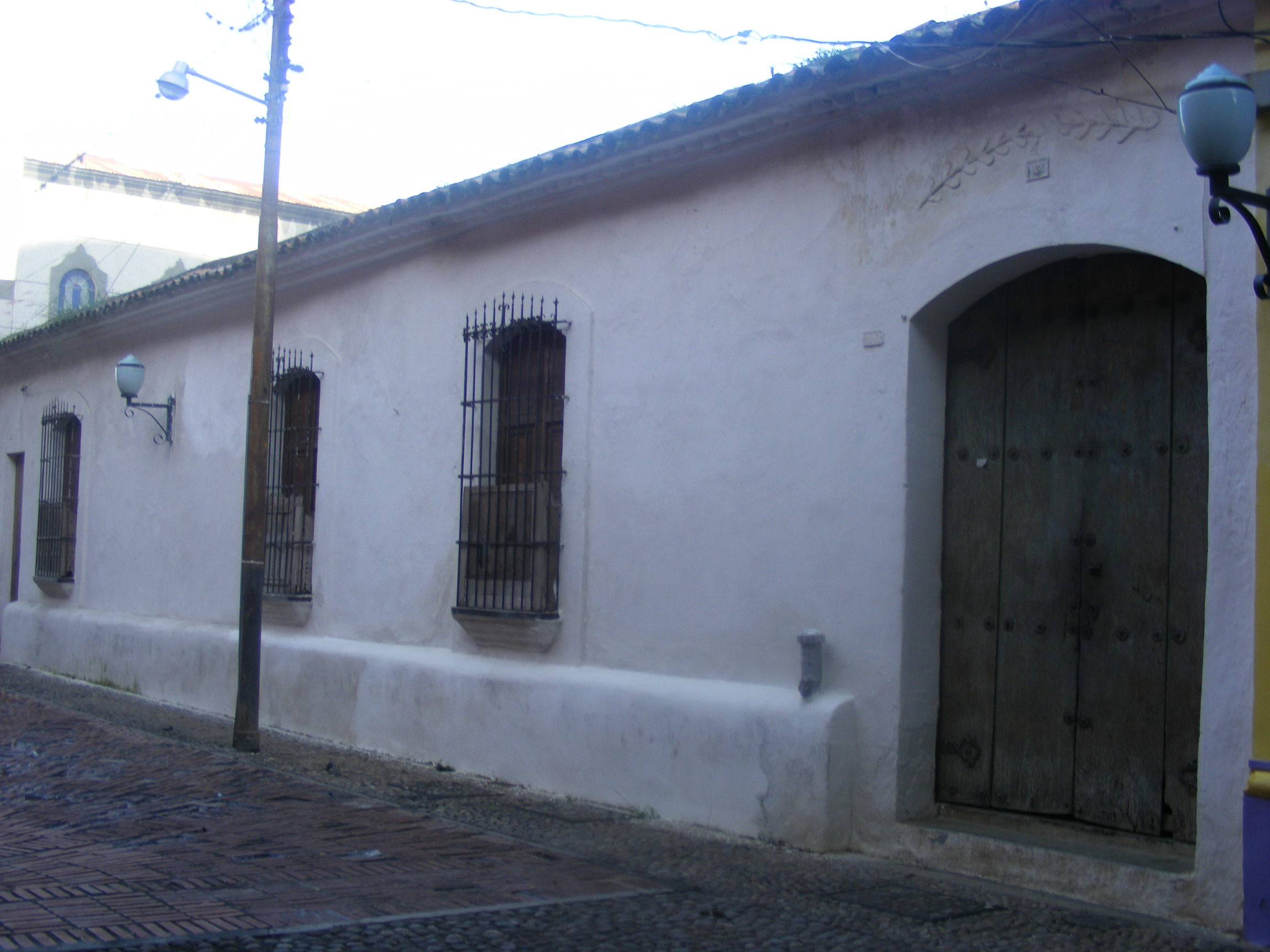 Barquisimeto, Edo. Lara